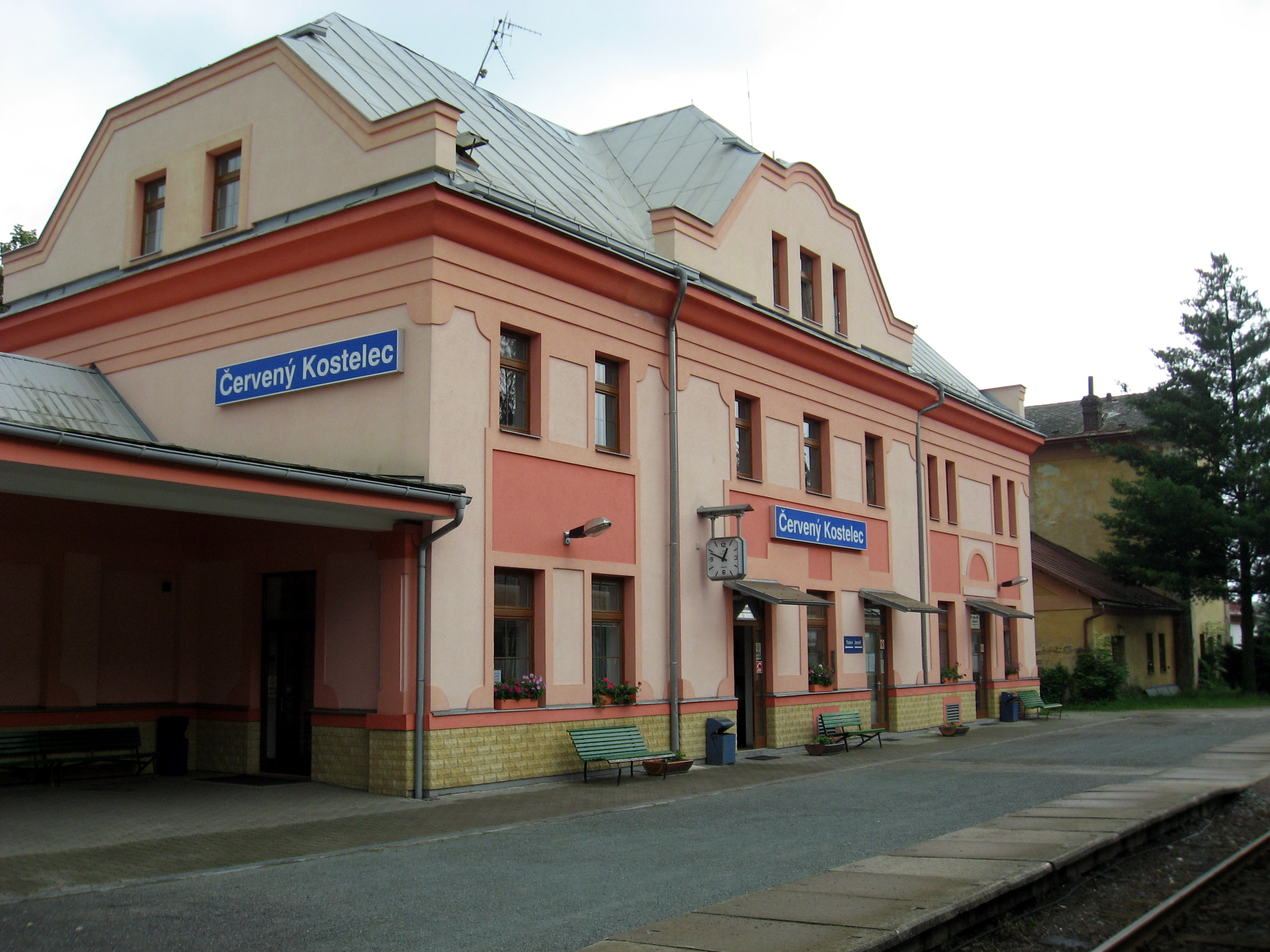 Česky: Červený Kostelec, nádraží